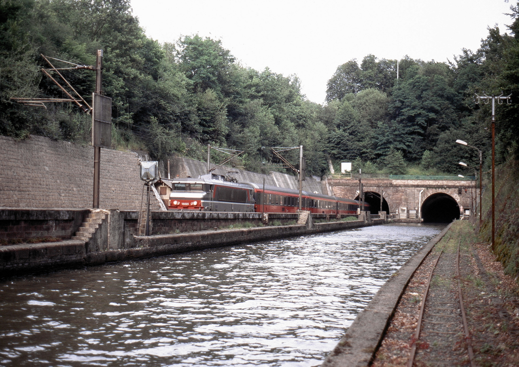 Kanal- und Bahntunnel und Treidelbahn Arzviller